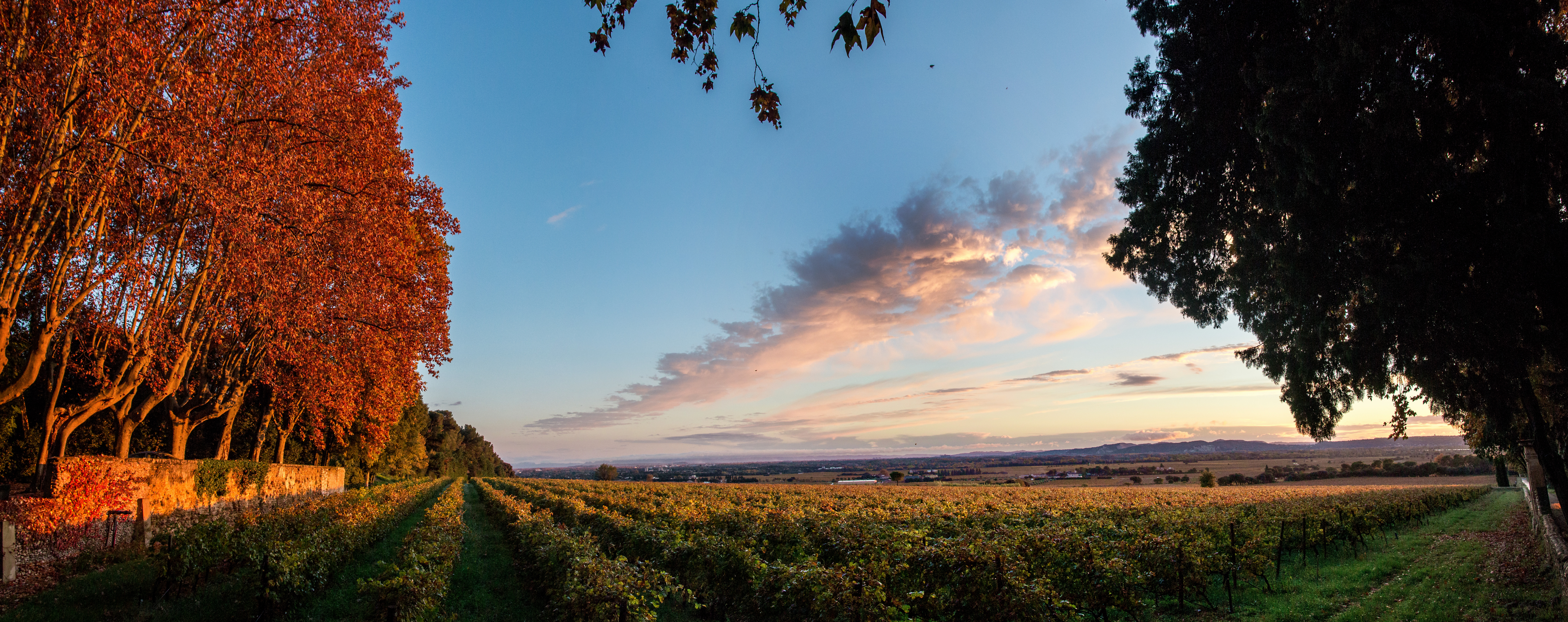 Vignoble "Clos de Beauvenir" du Château La Nerthe, à Châteauneuf-du-Pape